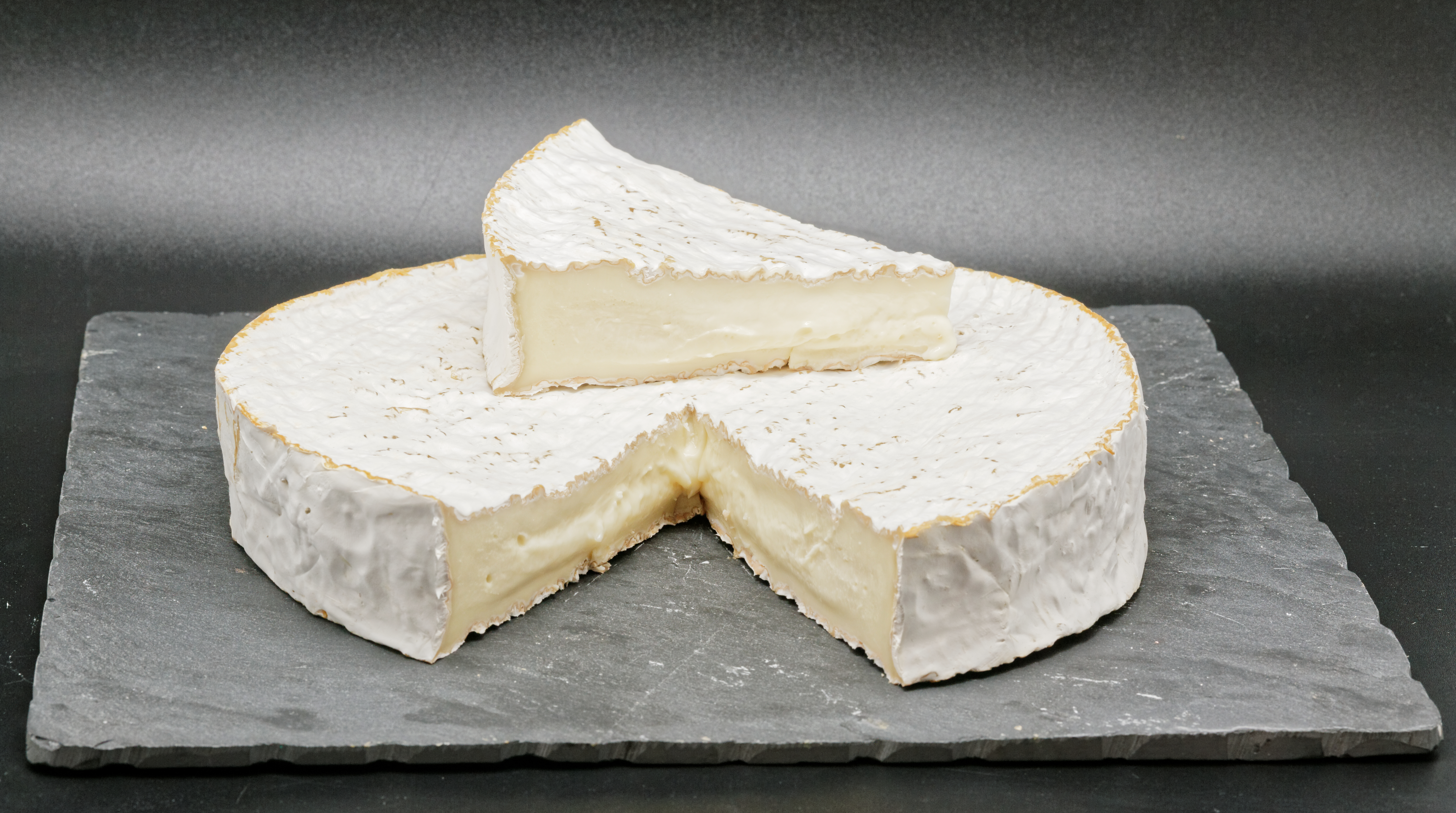 Le brie de Melun est une appellation d'origine désignant un fromage au lait cru de la région de la Brie et de Melun.